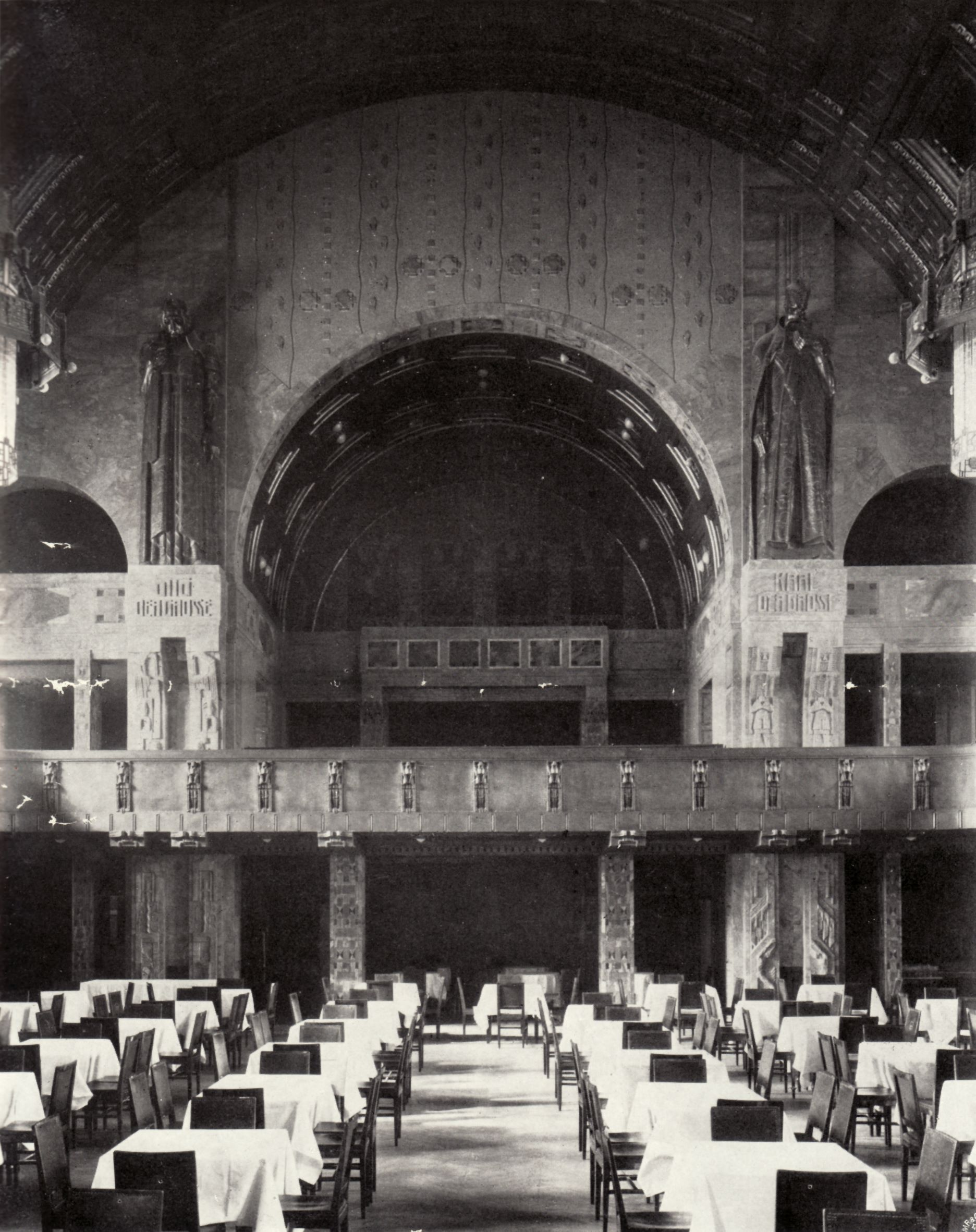 Berlin - Weinhaus Rheingold, Ansicht des Kaisersaales